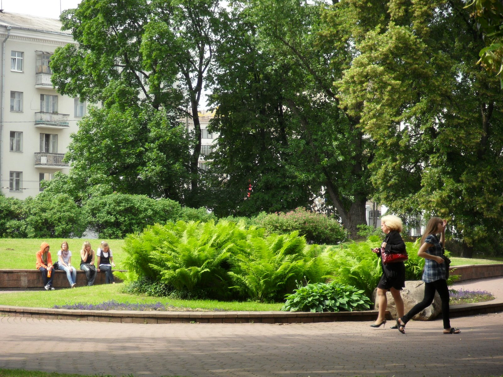 Михайловский сквер